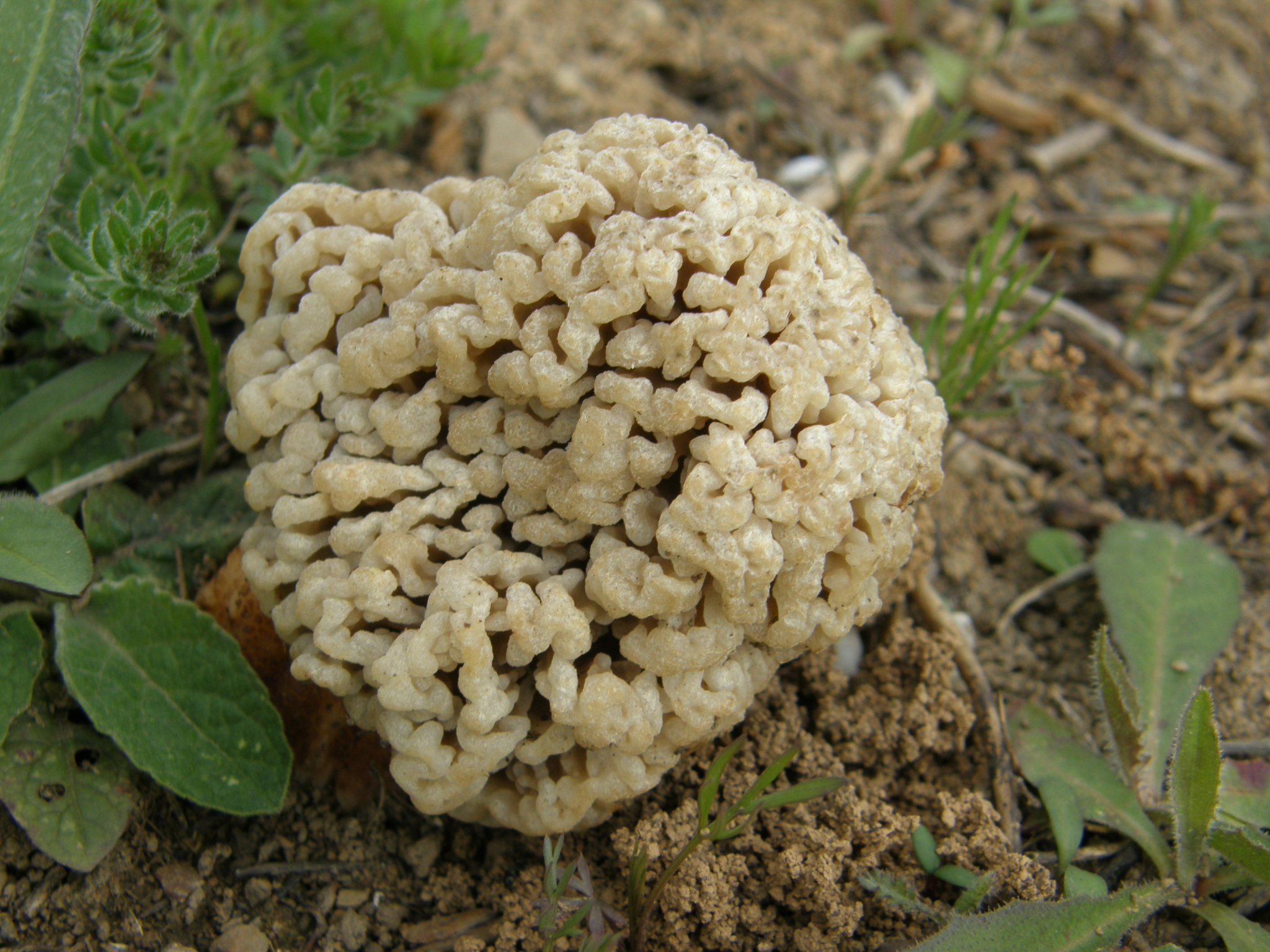 Гриб в Донецке